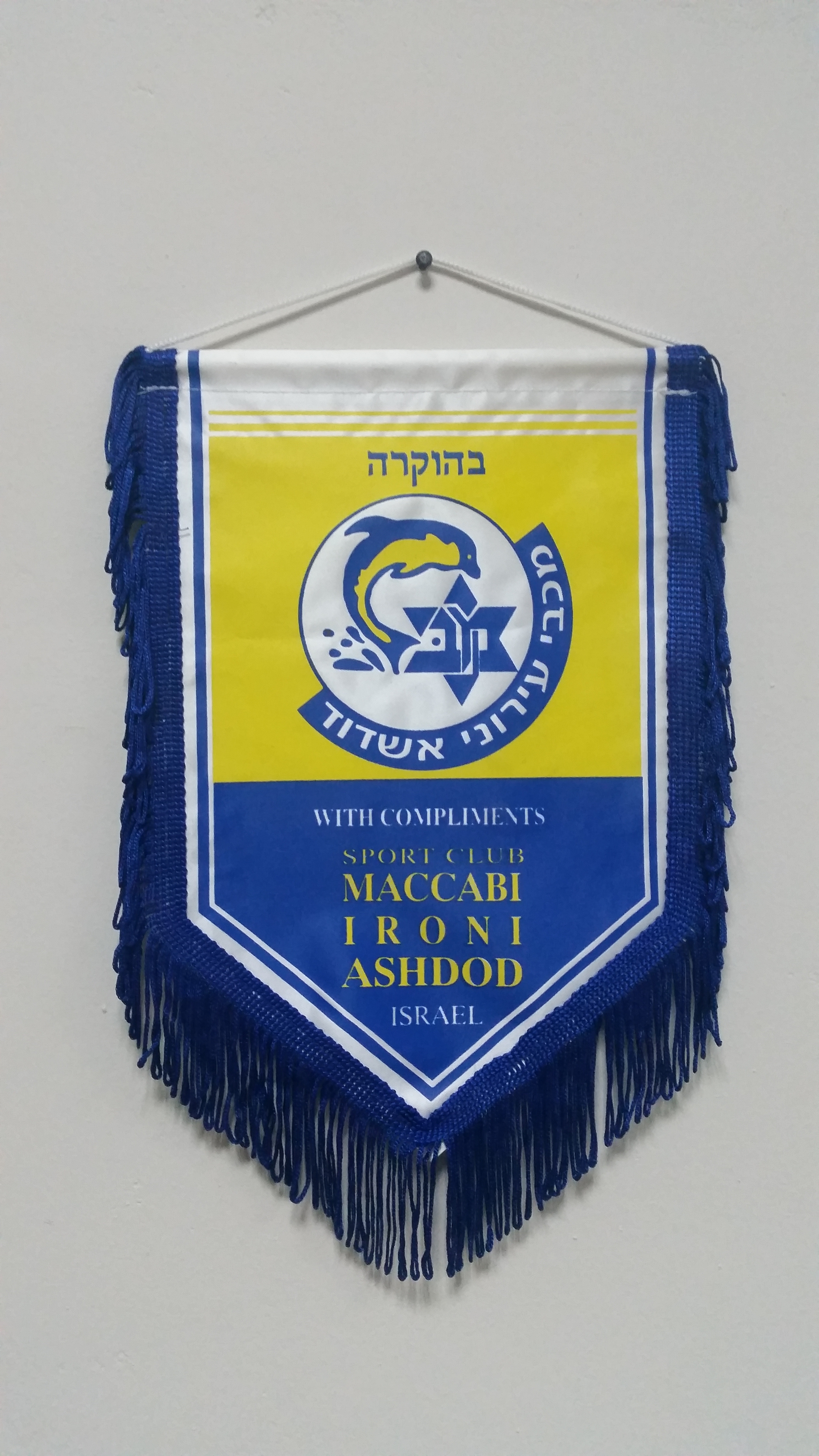 מכבי עירוני אשדוד: דגלון הוקרה מעונת 1998/1999